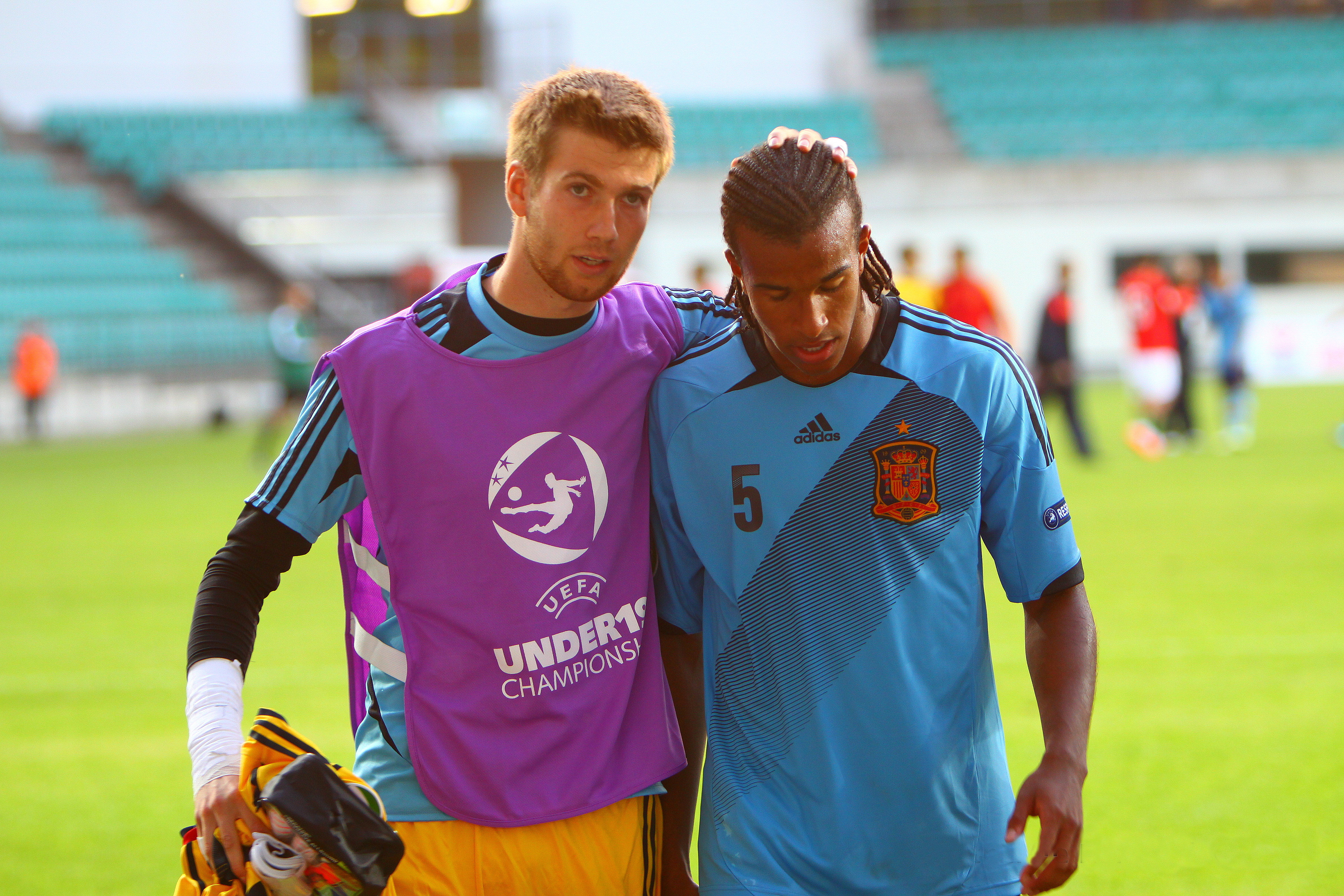 U-19 Portugal vs Spain.